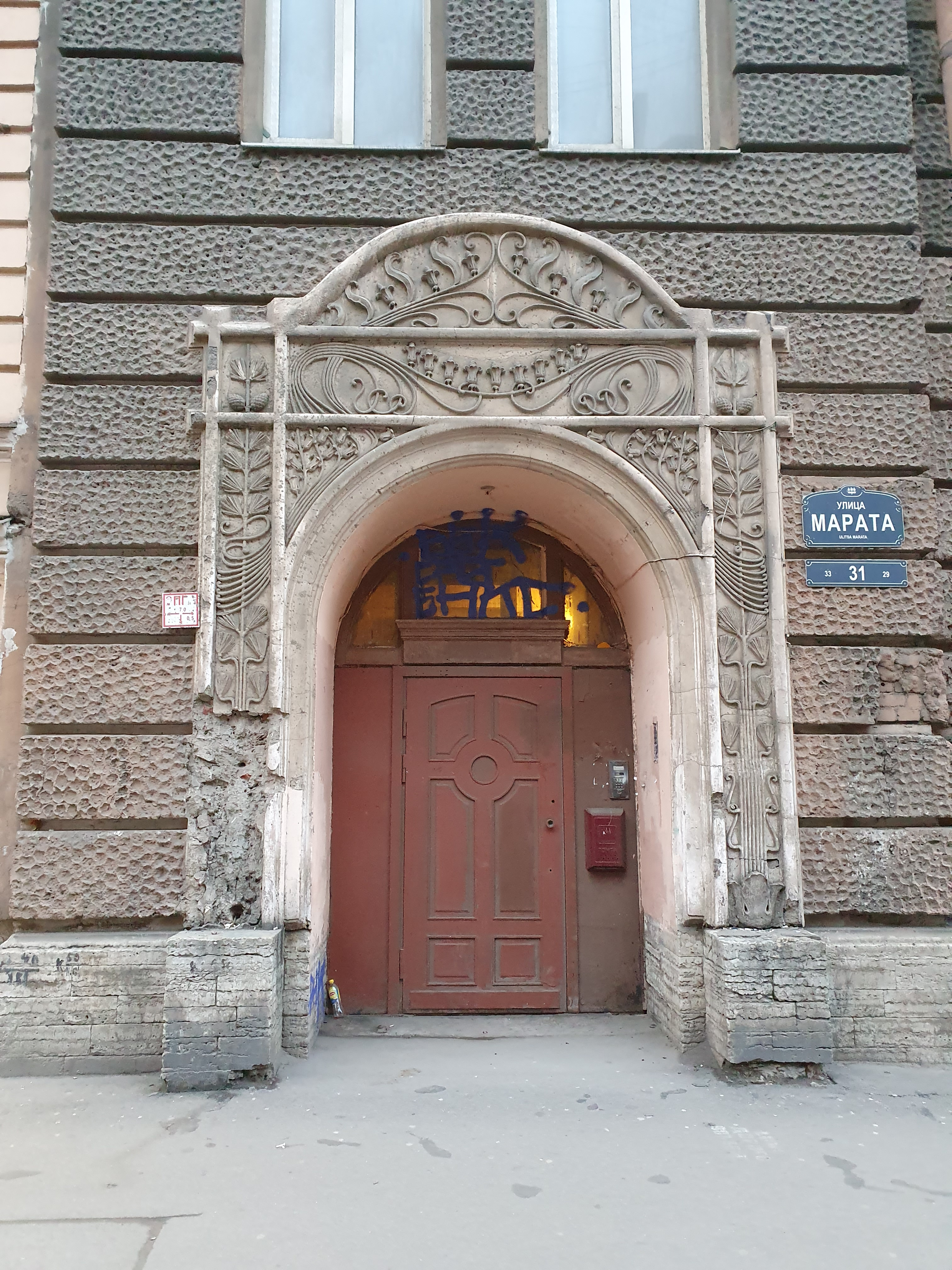 Дом А. Я. Барышникова в Санкт-Петербурге по адресу ул. Марата, 31. Арх-р А. А. Барышников, 1897-1899.